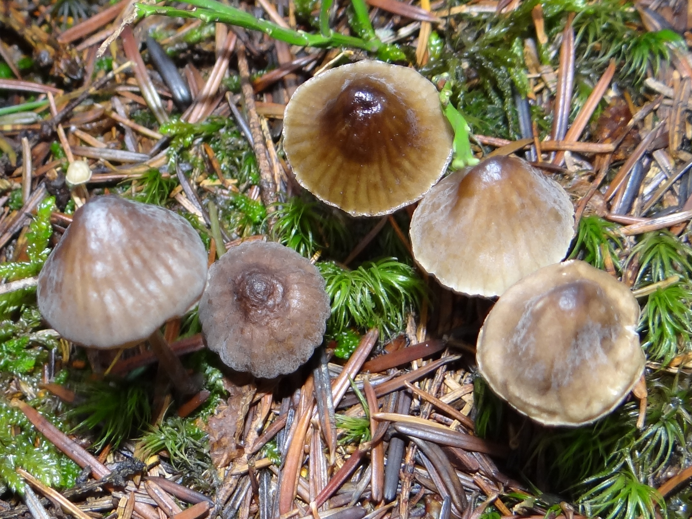 Mycena alcalina